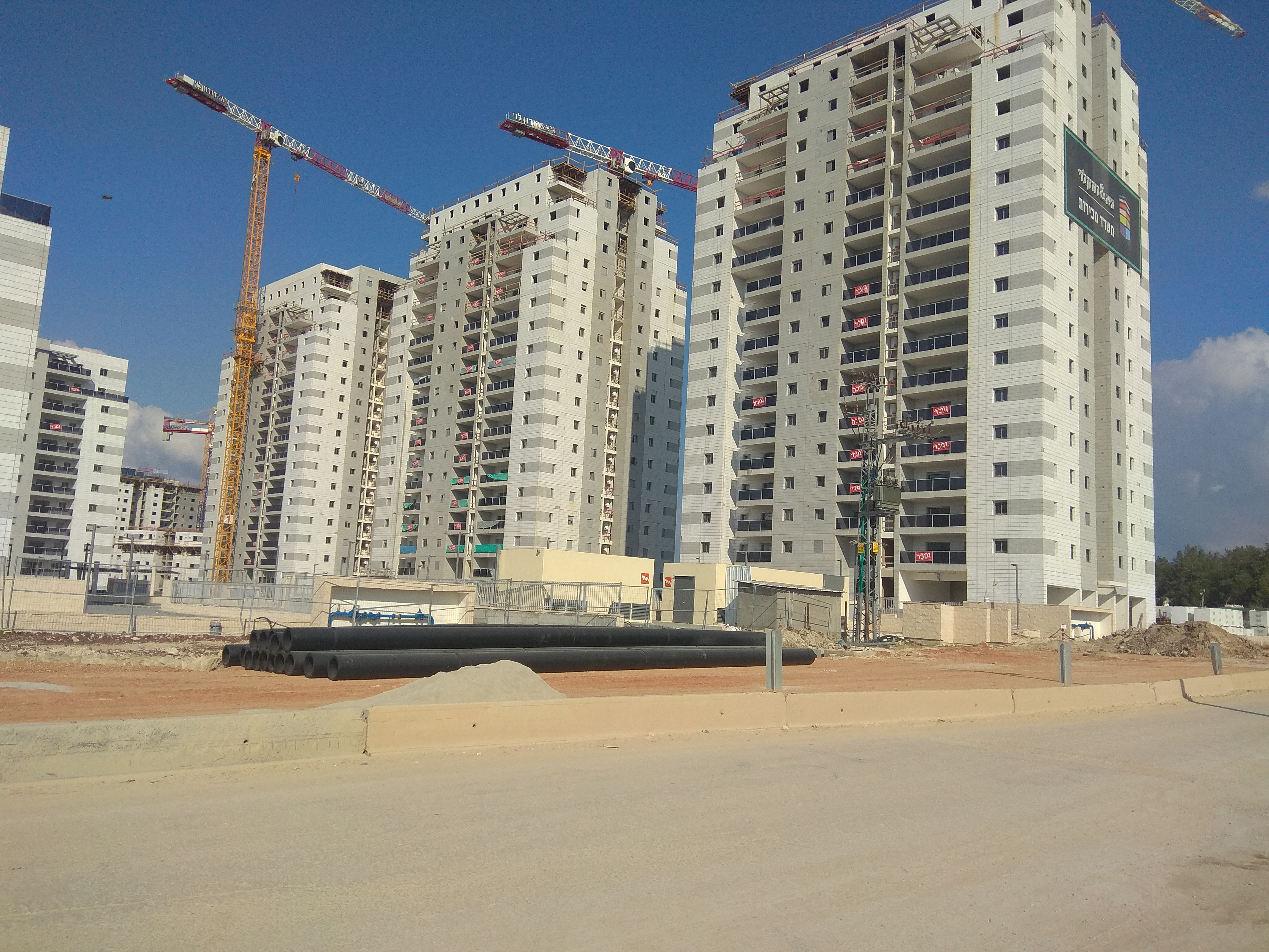 נאות אפק